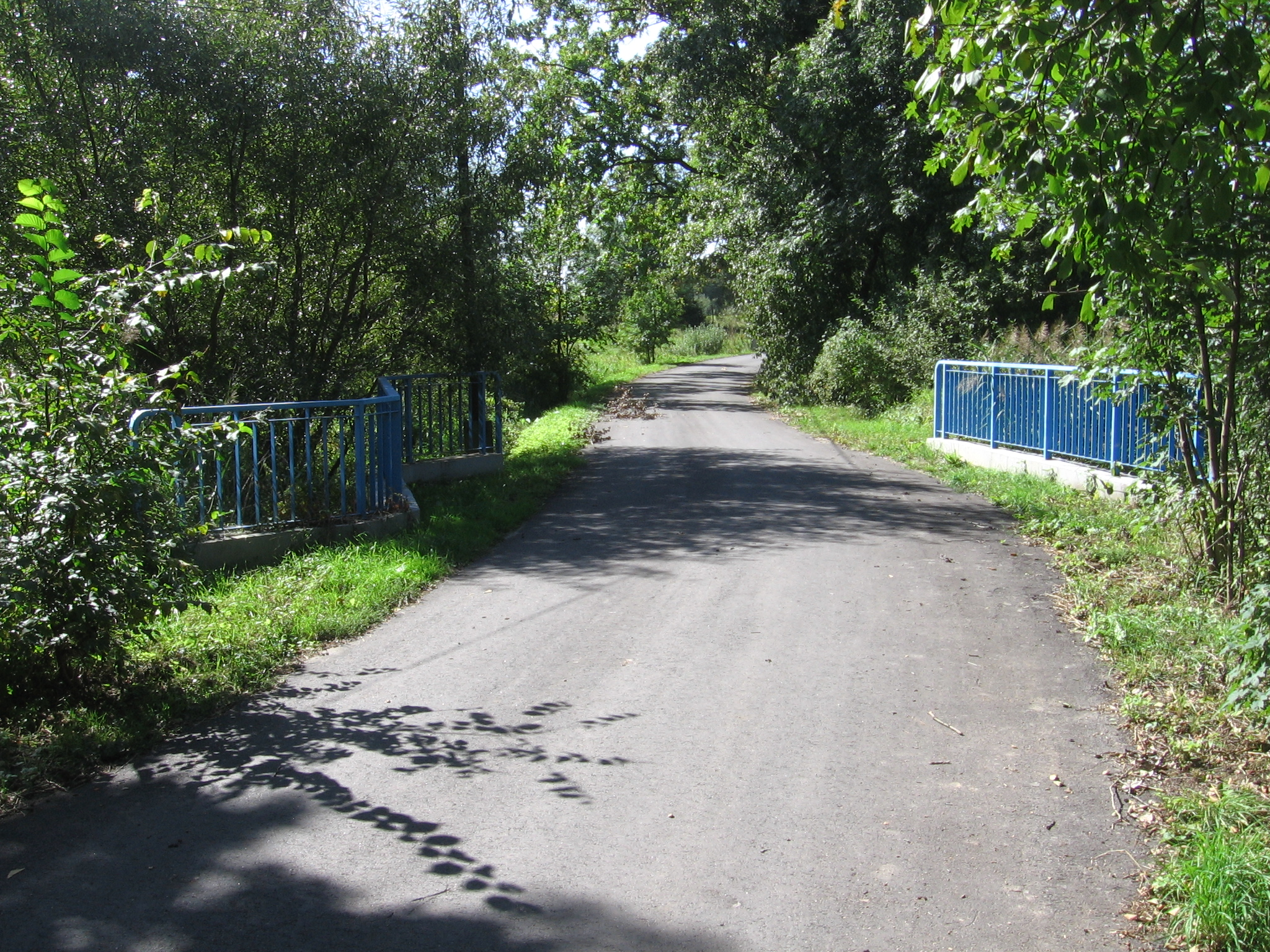 Wrocław, ulica Gałowska, mostek nad strumieniem Ryńka